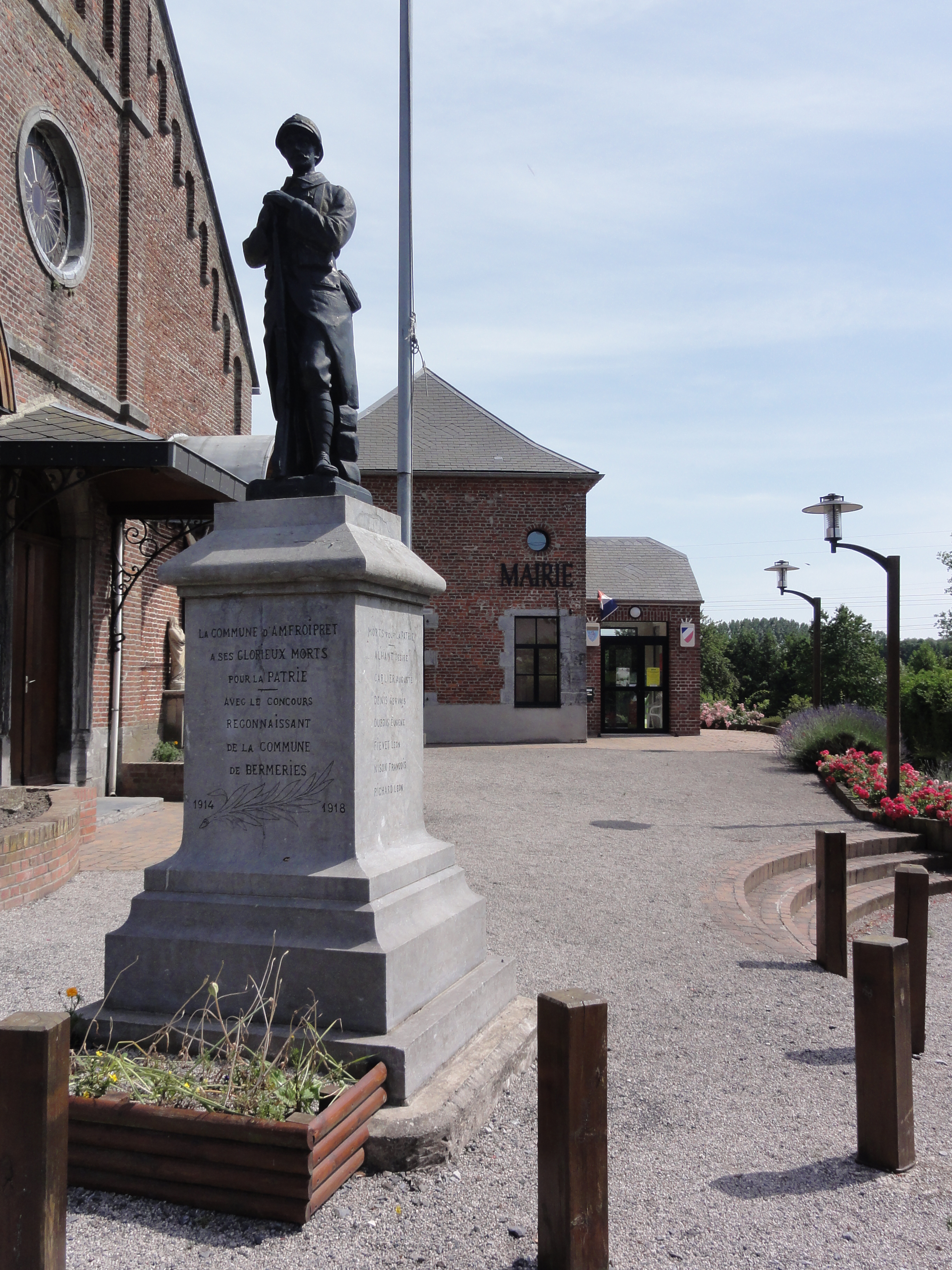 Amfroipret (Nord, Fr) monument aux morts devant la mairie. Le monument commémore aussi les morts de Bermeries.